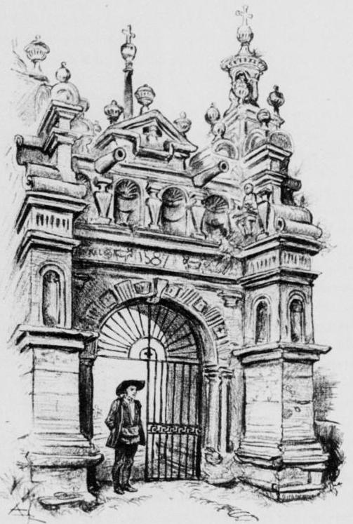 L'arc de triomphe du cimetière de Saint-Thégonnec (lithographie d'Albert Robida publiée dans "La vieille France, Bretagne" vers 1900)